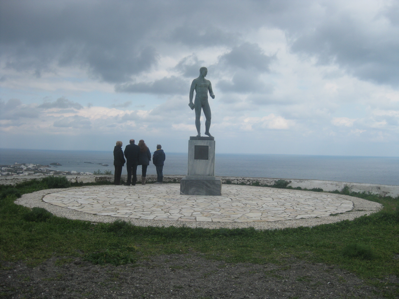 La place Brook à Skyros.